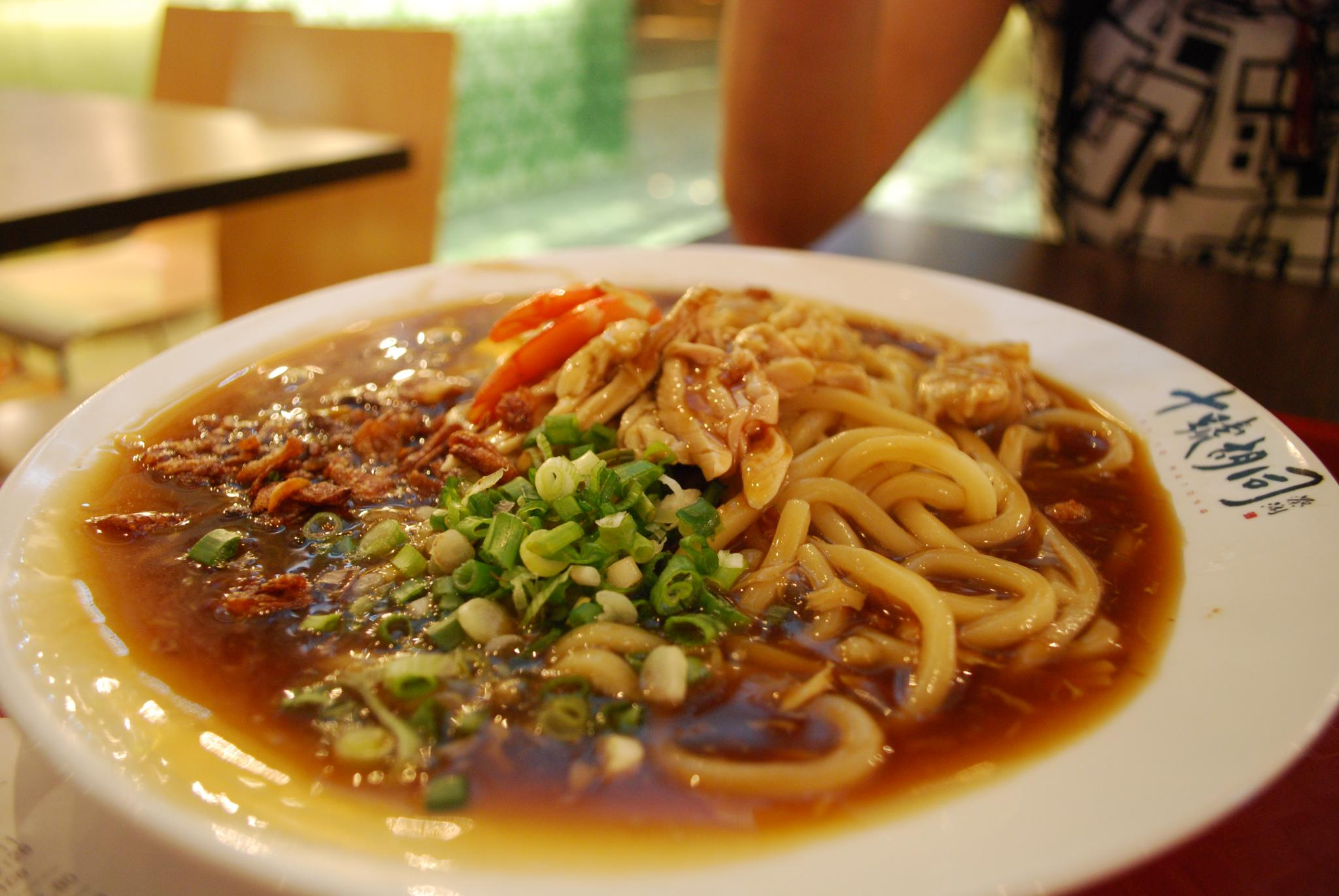 Lam Mee in KL